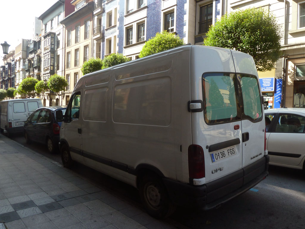 Furgón